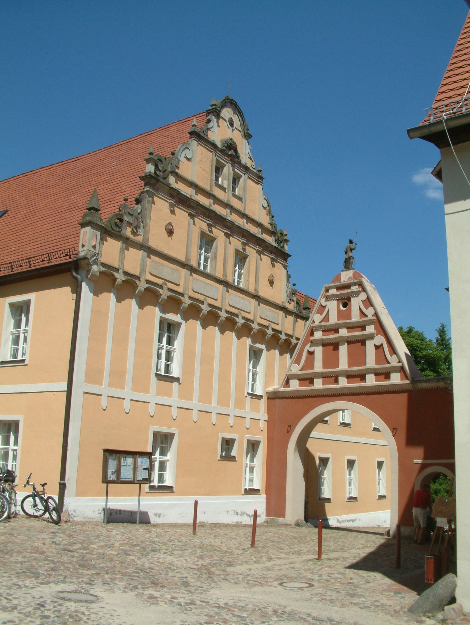 Town Hall of Wiesenburg/Mark; Rathaus Wiesenburg/Mark